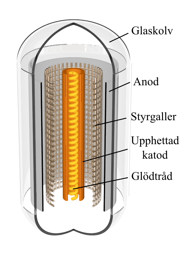 Elektronrör